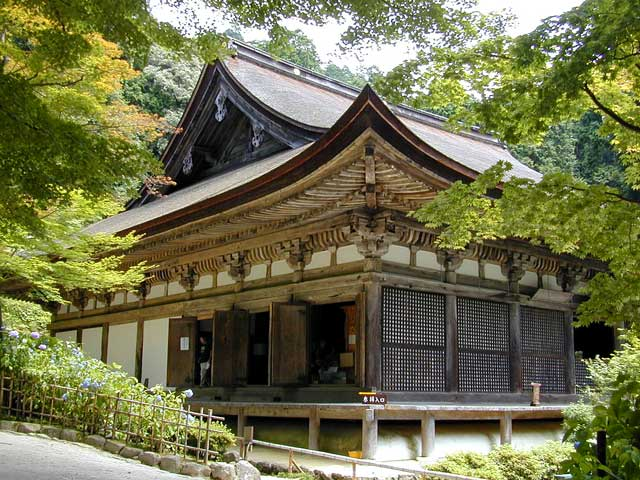 金剛輪寺（愛知郡愛荘町）の本堂。2000年7月撮影。